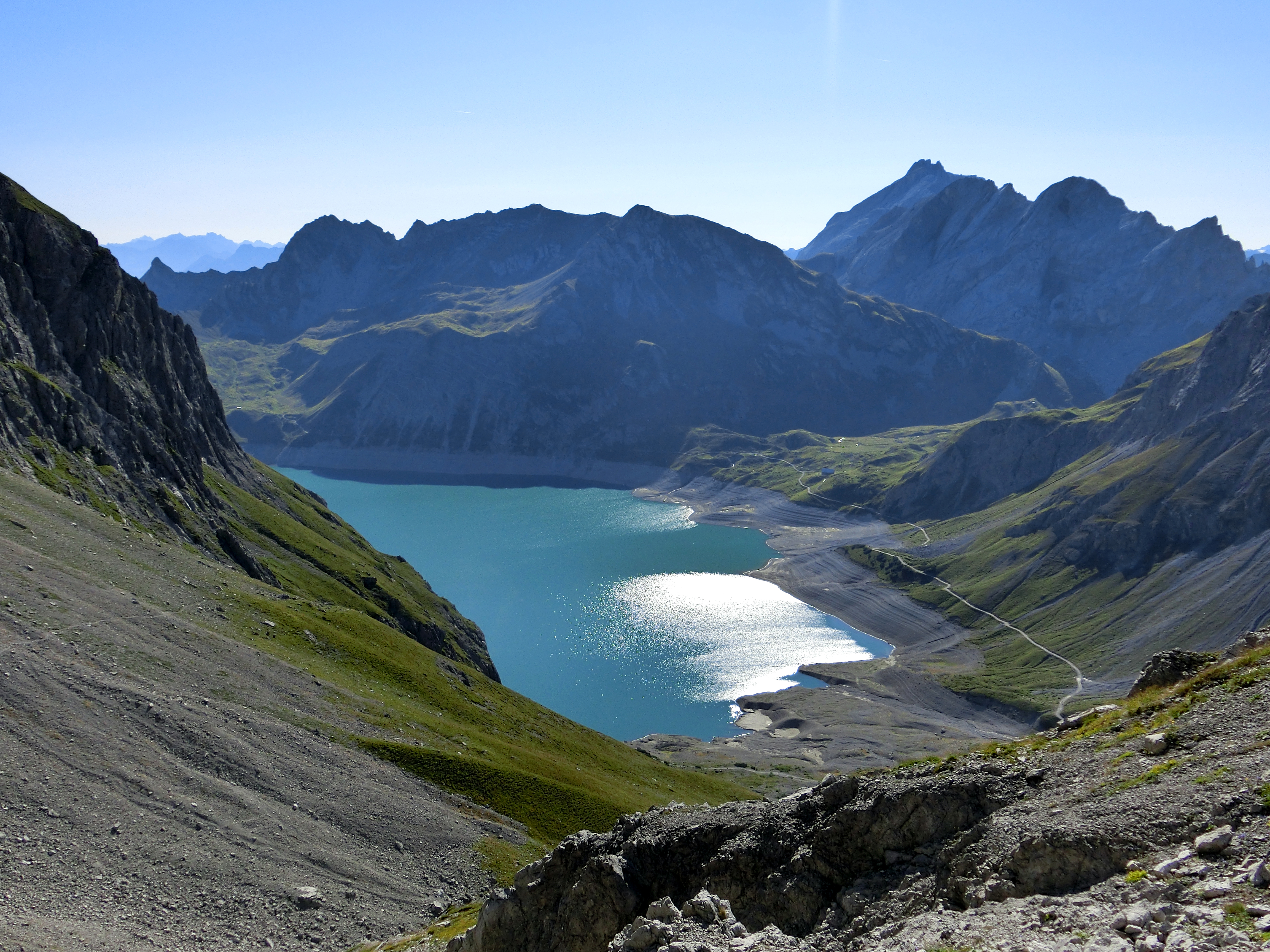 Lünersee